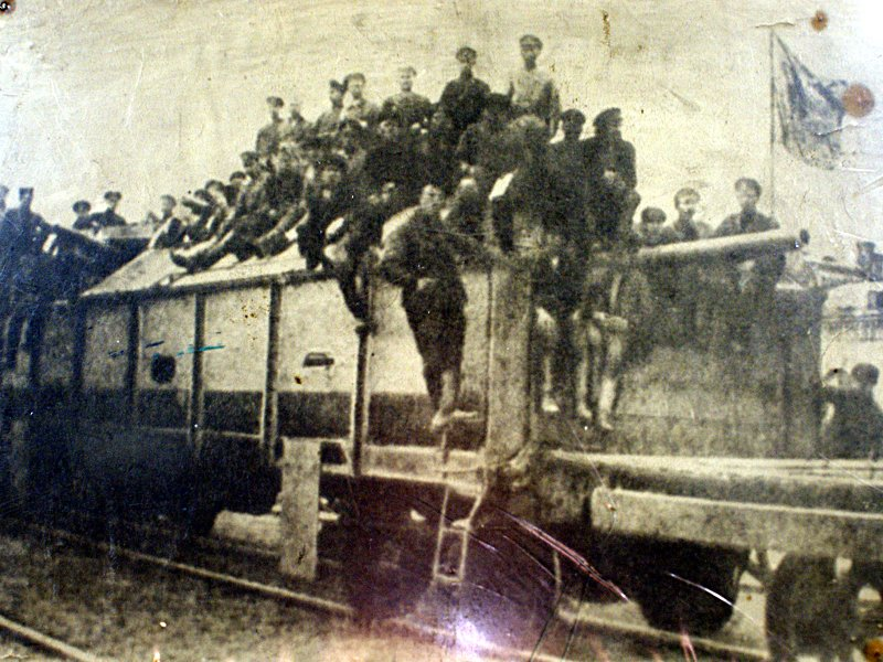 Бронепотяг № 79 станція Гришино 1919 рік